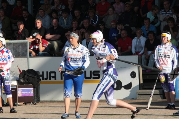 Petojussien Sanna Alestalo lyömässä ottelussa Petojussit-Lapuan Virkiä vuonna 2008